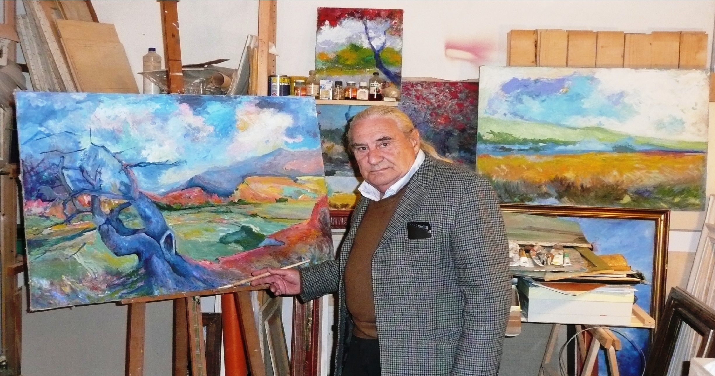 Paolo Salvati - expressionist painter